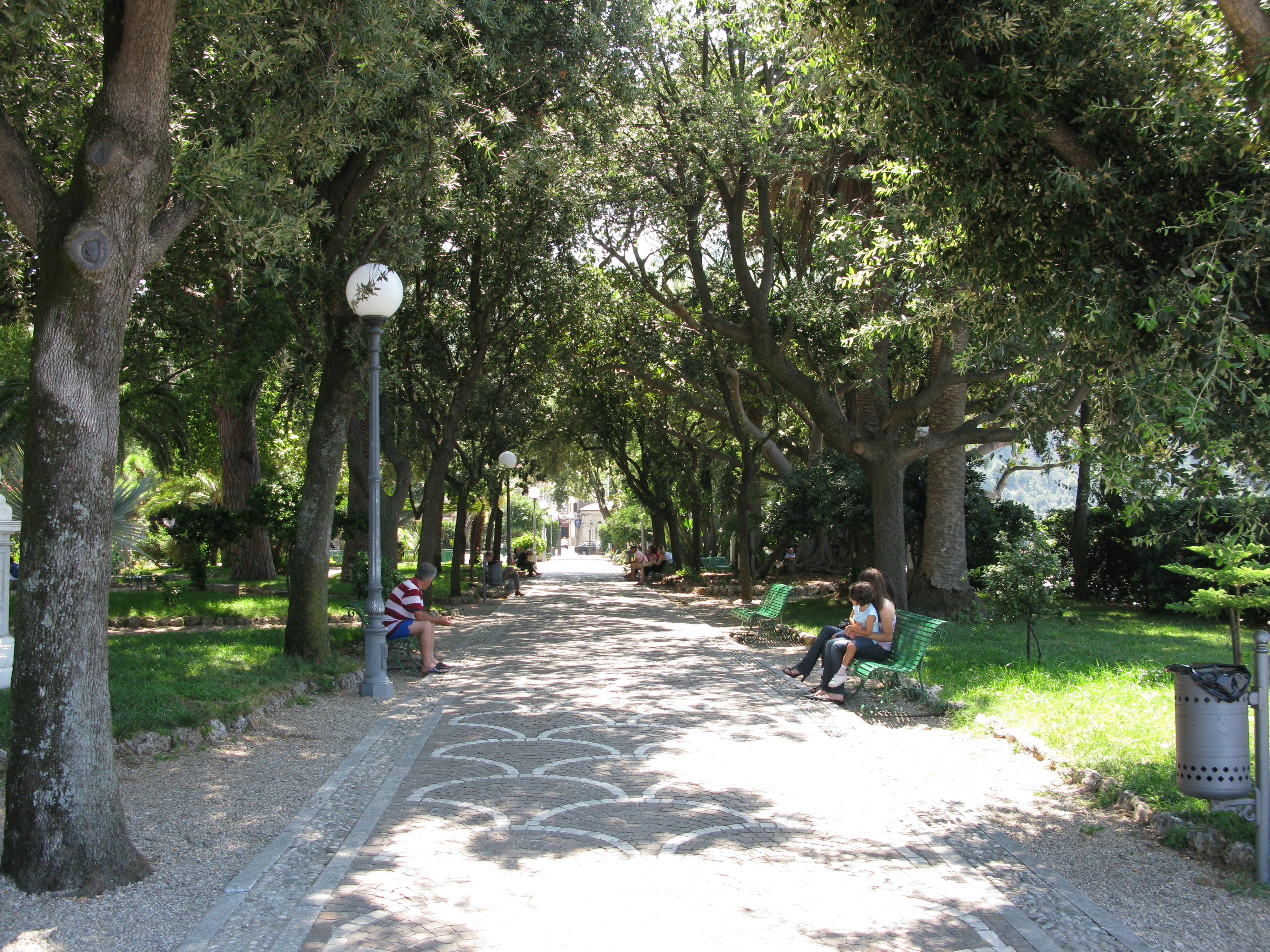 Villa comunale Giuseppe Mazzini (Palmi)